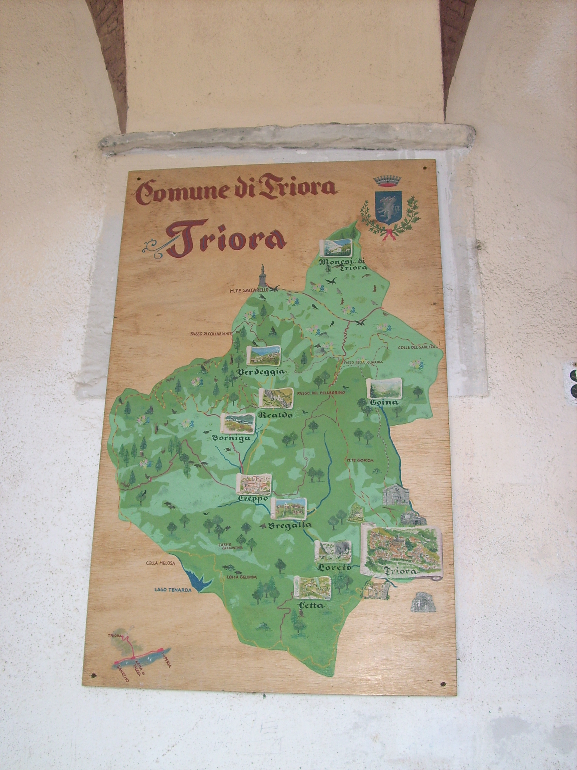 Mappa comunale di Triora, Liguria, Italia